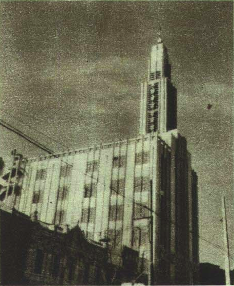 1952年上海百货公司